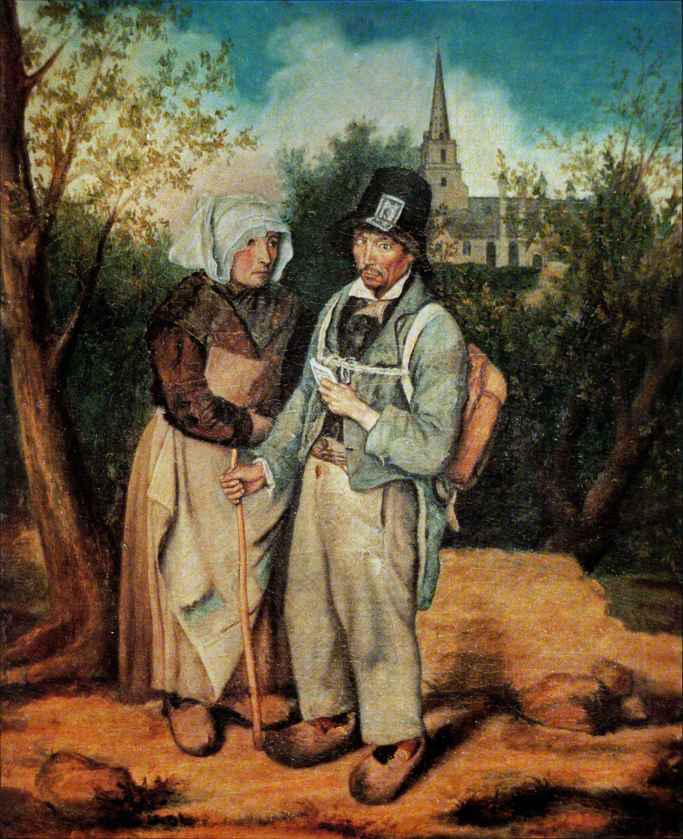 Un chanteur populaire et sa femme à Lannion (au fond on aperçoit l'église de Brelenez). Le havresac sur le dos, le bâton de houx à la main, le chanteur en sabots se met en route pour sa tournée estivale. A son chapeau, il a épinglé la marque de sa profession. Une autre feuille à la main, il est prêt à satisfaire le premier client venu.